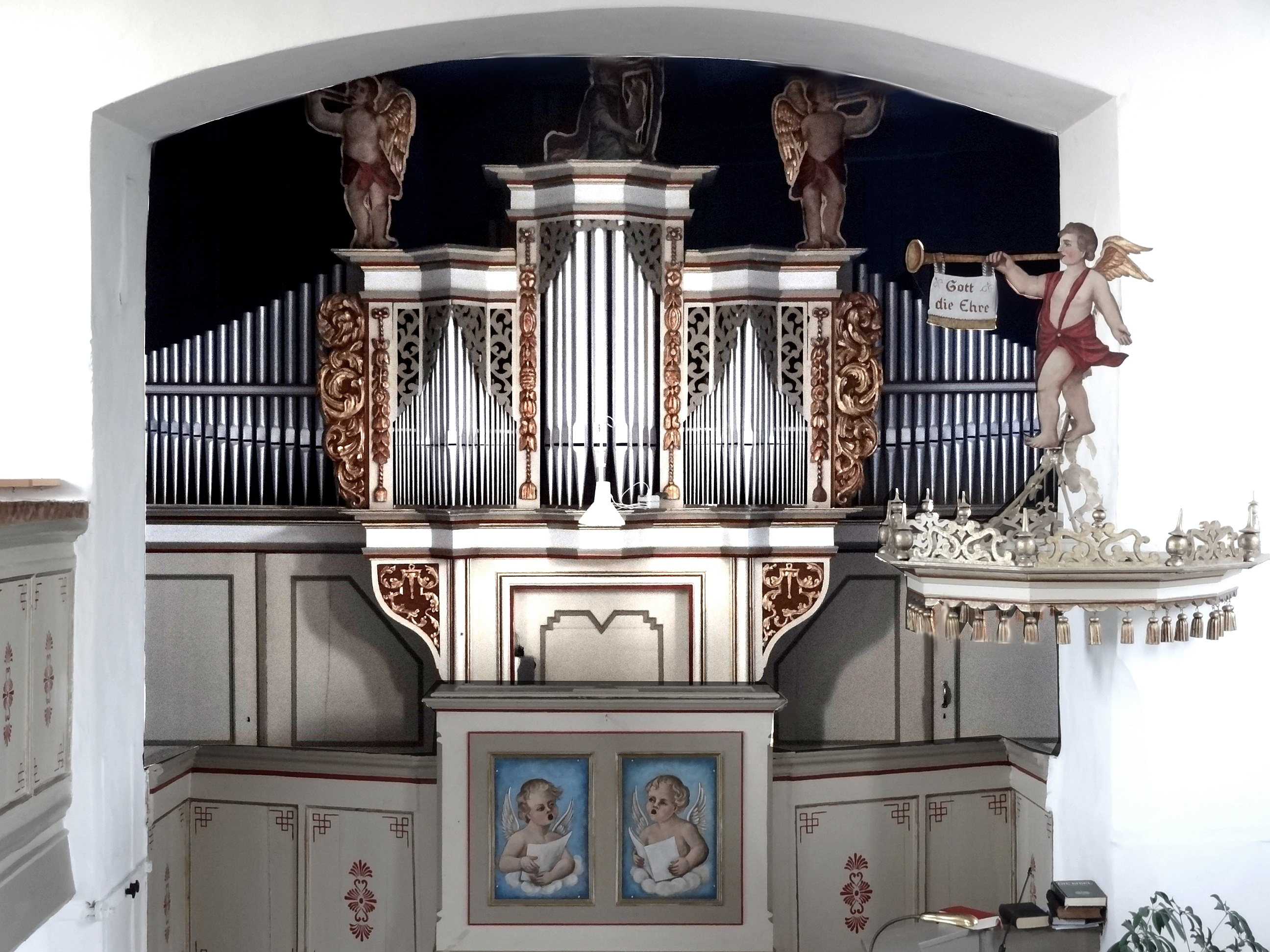 Evangelische Kirche Villingen (Hungen)